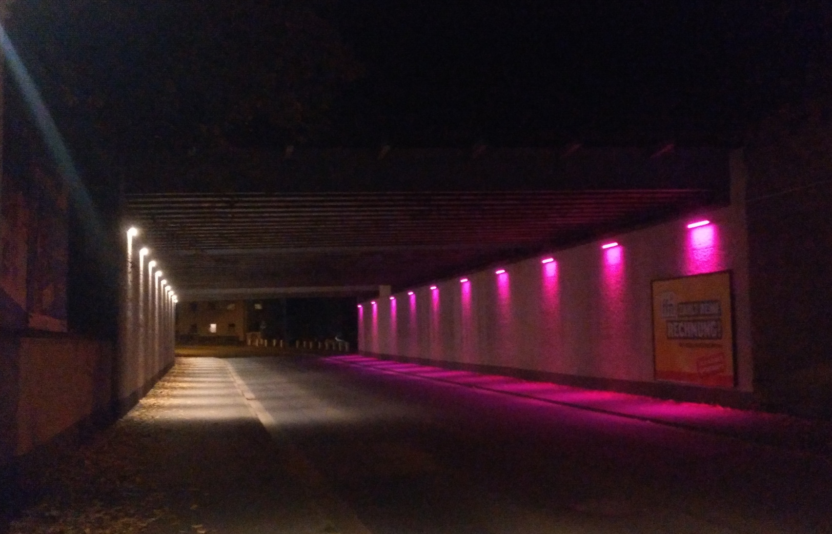 Unterführungsbeleuchtung der Bundesstraße 498 in LED-Farben, 23. Oktober 2019.